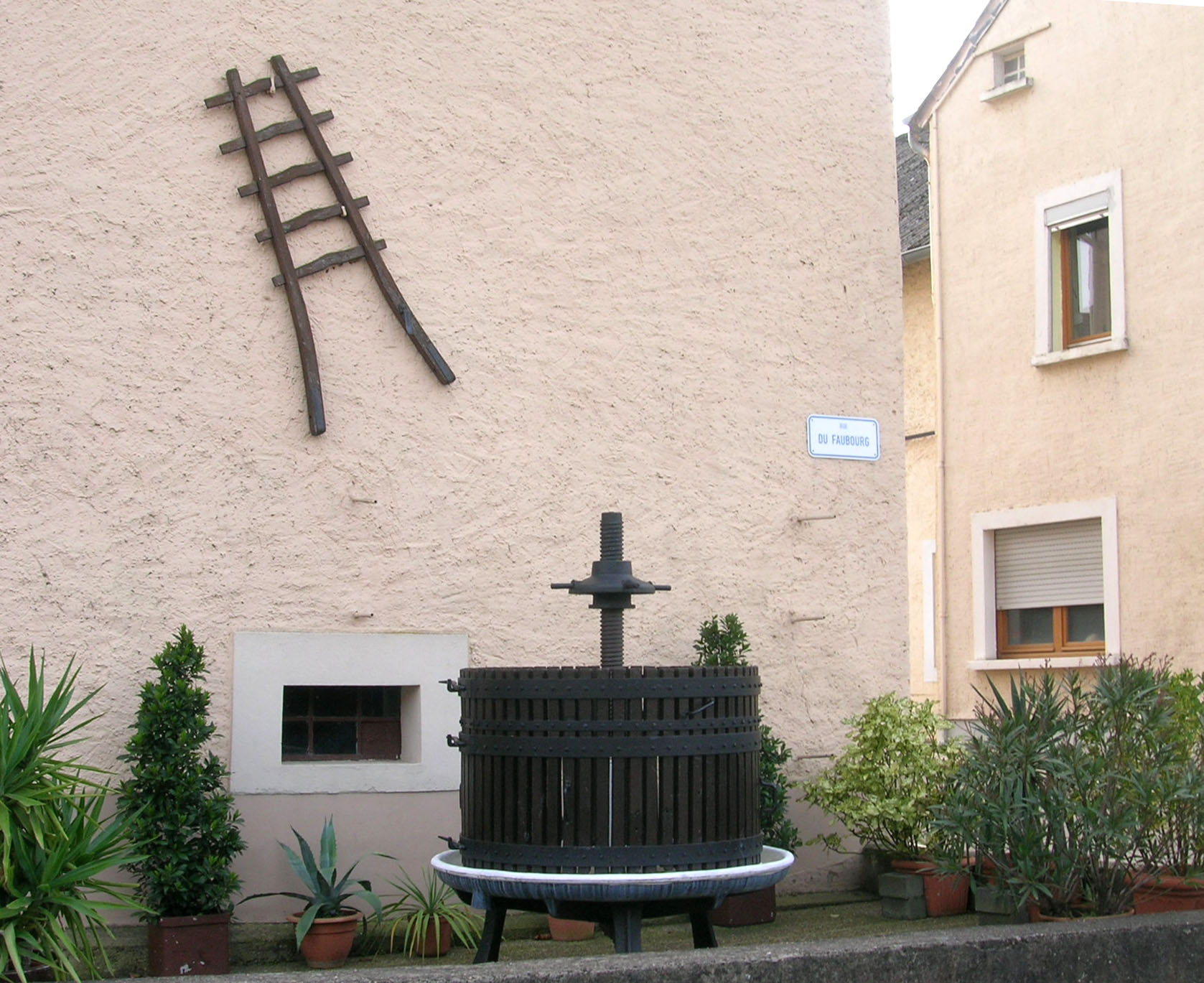 Haus matt Kellter zu Meechtem